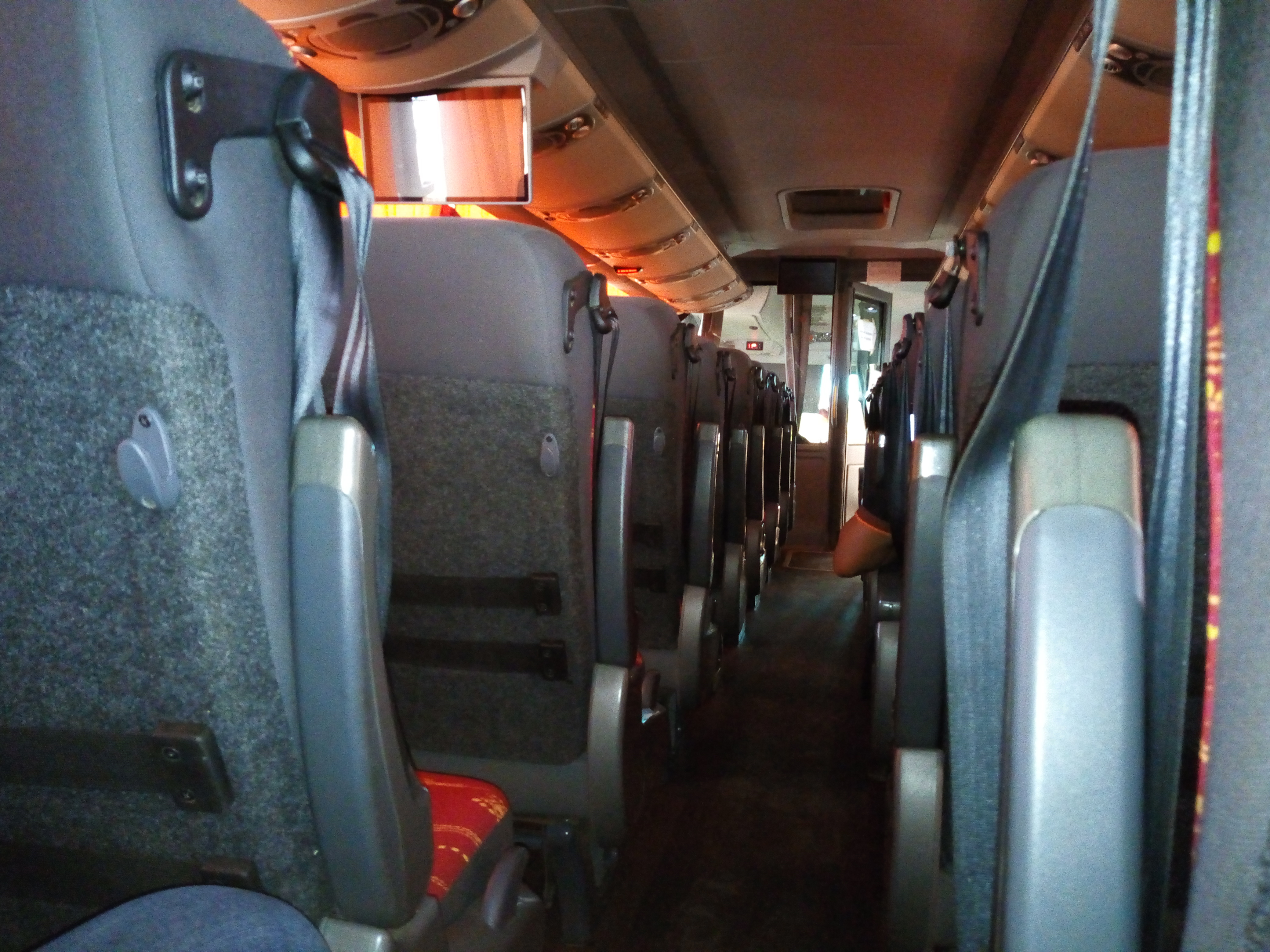 Intérieur d'un bus de transport commun au Bénin. c'est une de dos des sièges prise depuis le sièges des passagers